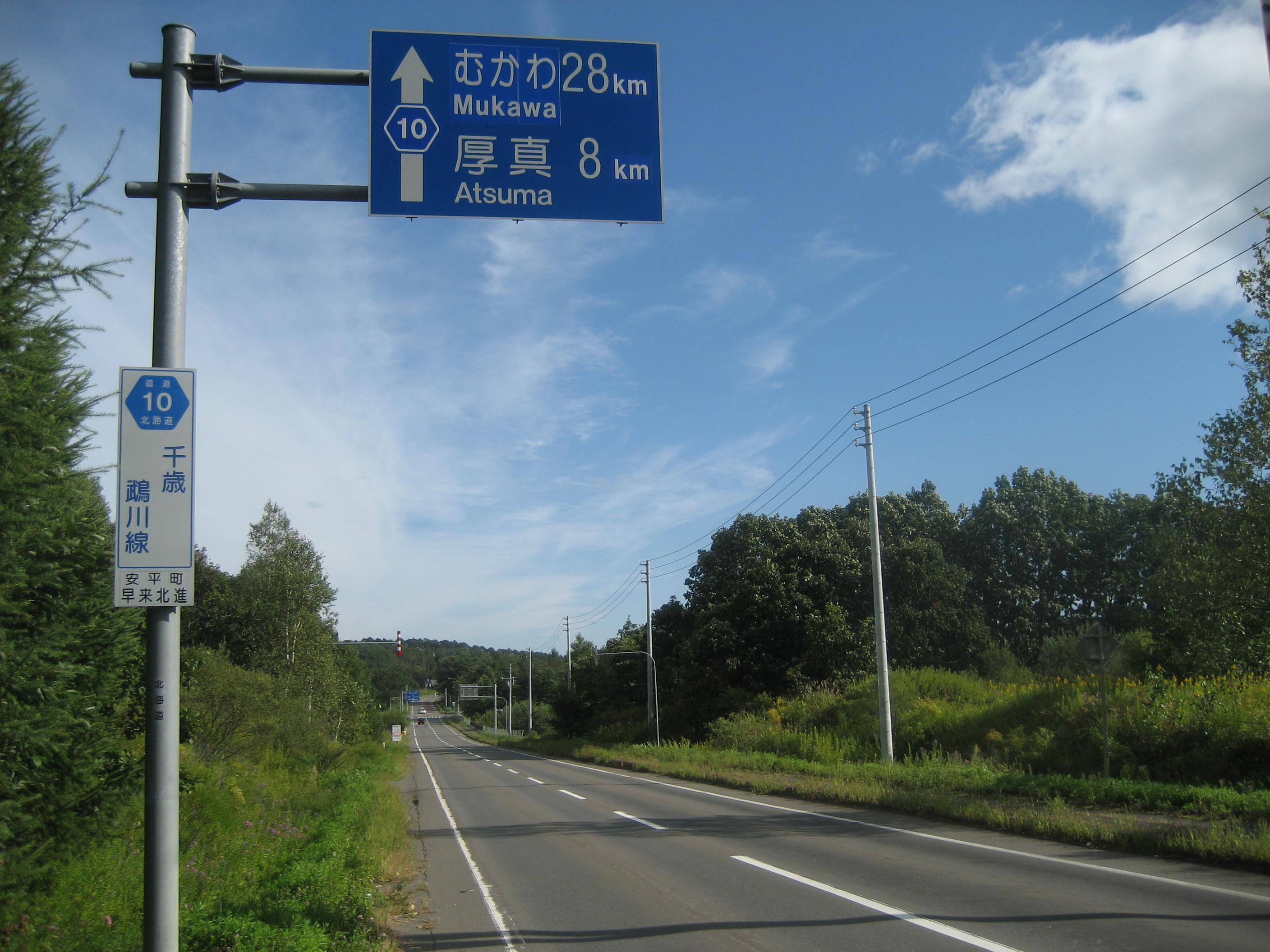 北海道道１０号線安平町早来北進付近（むかわ町方面を撮影）